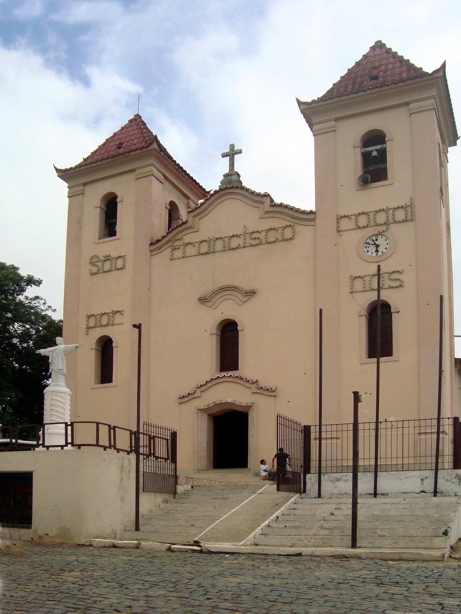 Igreja Matriz de Aratuba